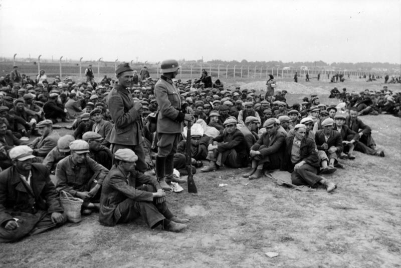 Gefangenenlager für Juden in Polen 1939